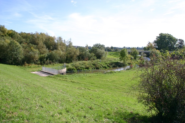 Altmühl unterquert Altmühlüberleiter